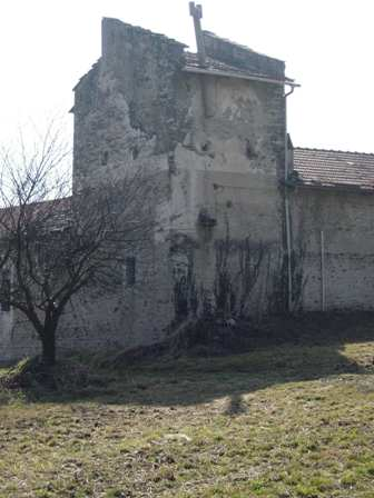 Castello di Bruzolo Colombaia costruita sullo spigolo Nord-Est della cinta esterna